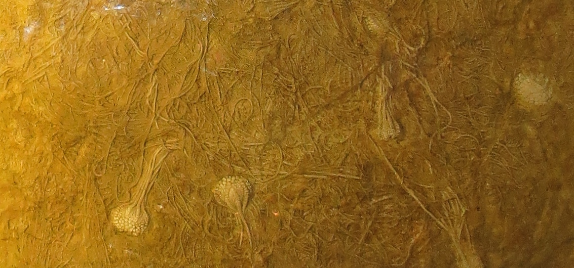 Took the picture at Senckenberg Museum, Frankfurt